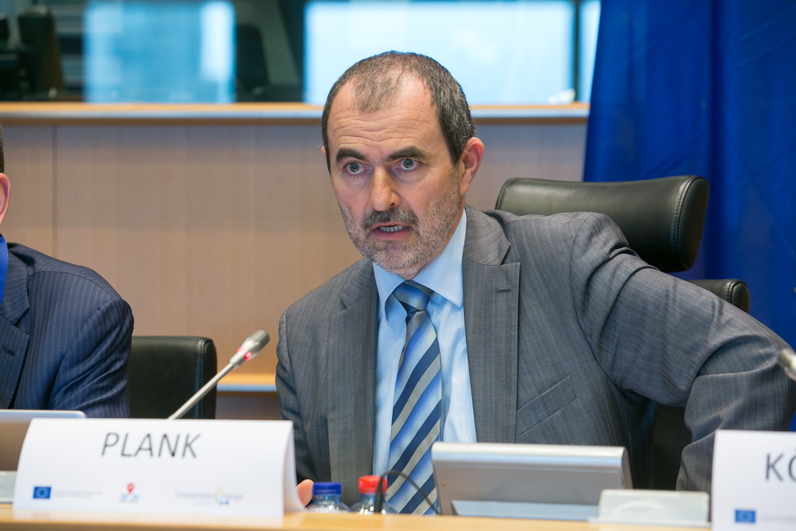 Elisabeth Köstinger ist heute Gastgeberin einer Diskussionsveranstaltung, die sie gemeinsam mit dem Präsidenten des Dachverbands Erneuerbare Energie Österreichs, Josef Plank, im Europäischen Parlament veranstaltet. Thema der Debatte mit Abgeordneten aller Fraktionen sind die Auswirkungen der geplanten Energiewende in Europa. Österreich zählt hier zu den Vorreitern in Europa. Unser Knowhow kann zum Erolg der geplanten europäischen Energieunion beitragen, betont Köstinger, Umweltsprecherin im EU- Parlament.